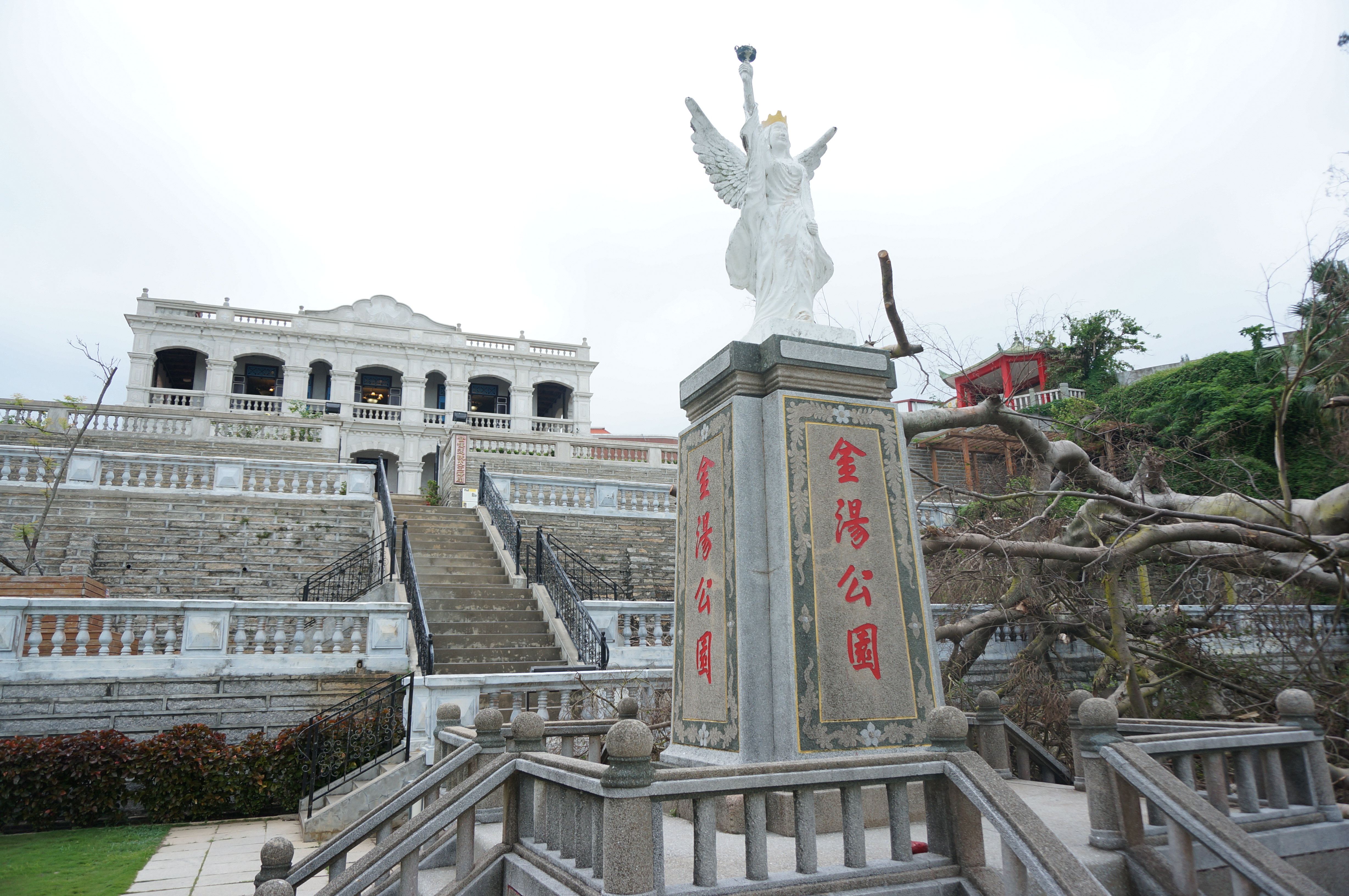 大氣的歐式庭院，讓陳景蘭洋樓與鼓浪嶼之歐式洋樓不惶多讓。